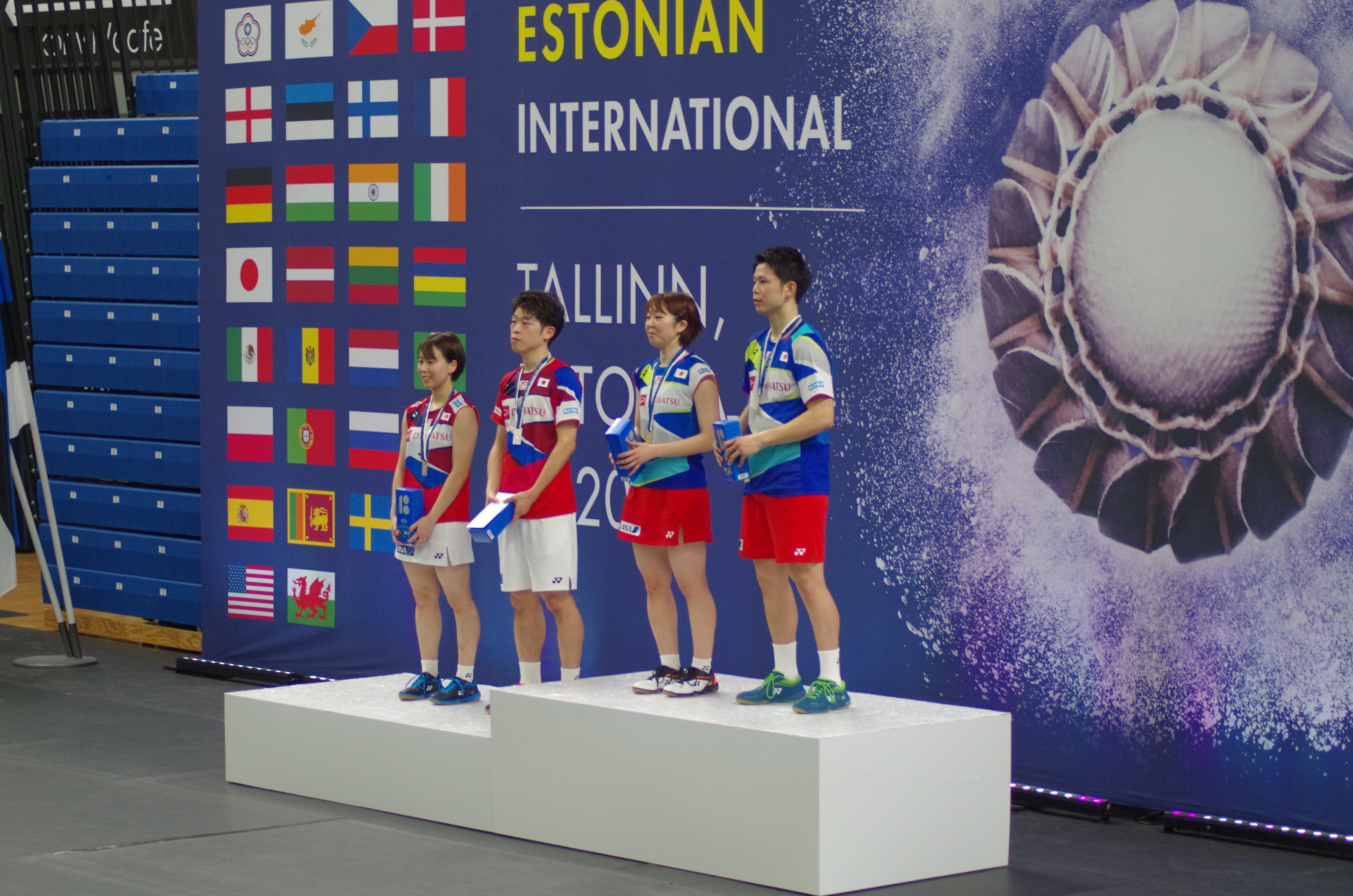 Turniiri YONEX Estonian International 2020 segapaarismängu finalistid poodiumil